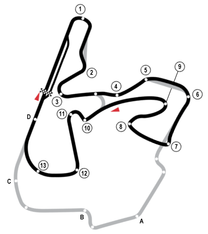 Circuit Park Zandvoort. Kopie van bewerkt. Was gemaakt door Arz, aldaar public domain. Categorie:Afbeelding circuit